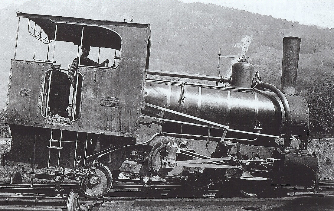 Die Zahnraddampflokomotive Nummer 2 der ARB